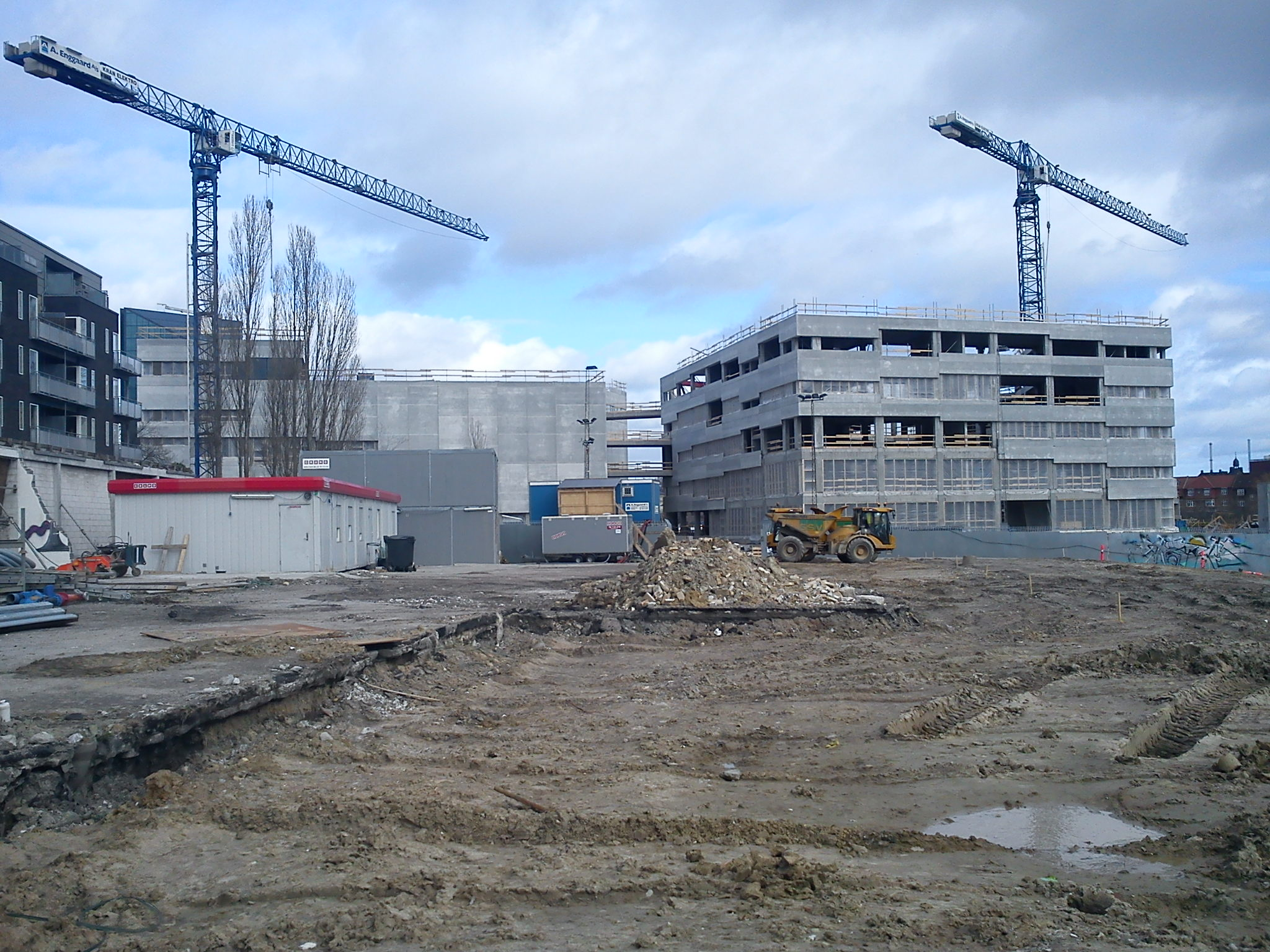 CeresByen under udvikling. Det nye VIA center.